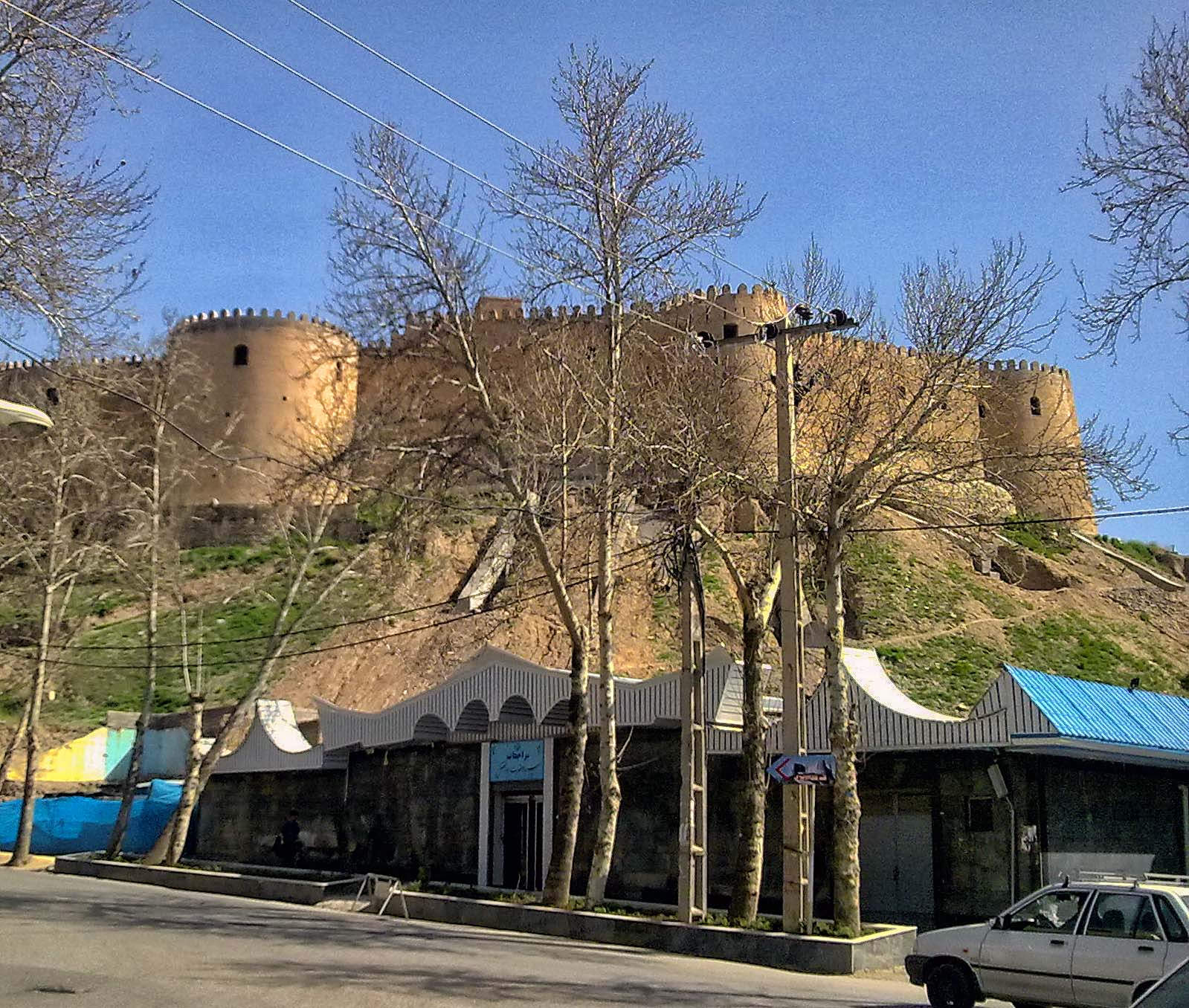 خسته نباشید